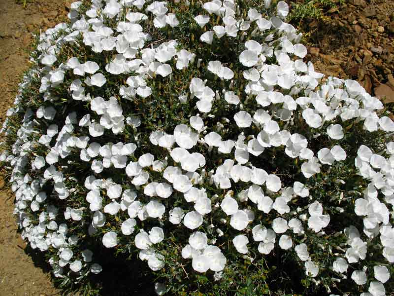 سرمشک